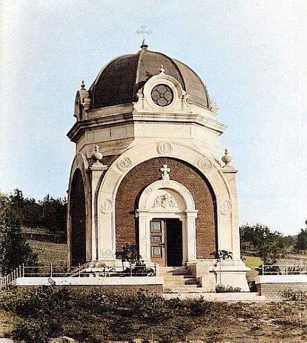 Ds Mausoleum wurde im Stil der Sezession errichtet und befindet sich am Friedhof von Klobusicz (heute Stadtteil von Ilava).